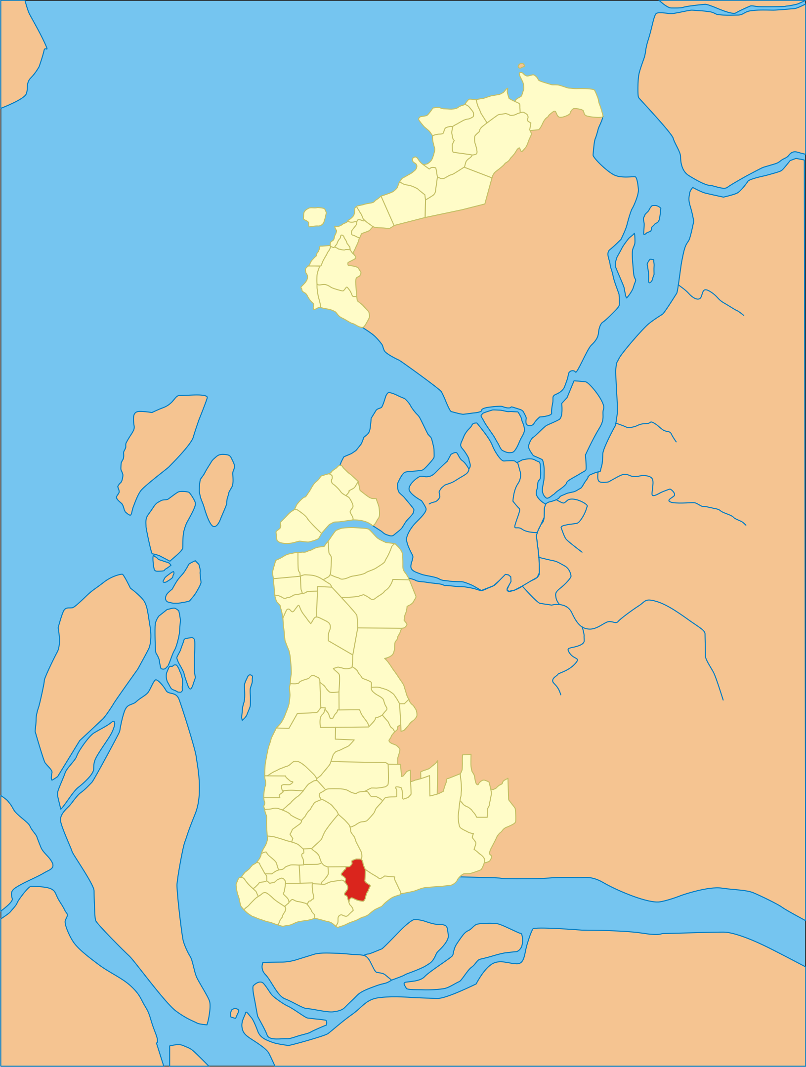 Localização do bairro em Belém do Pará